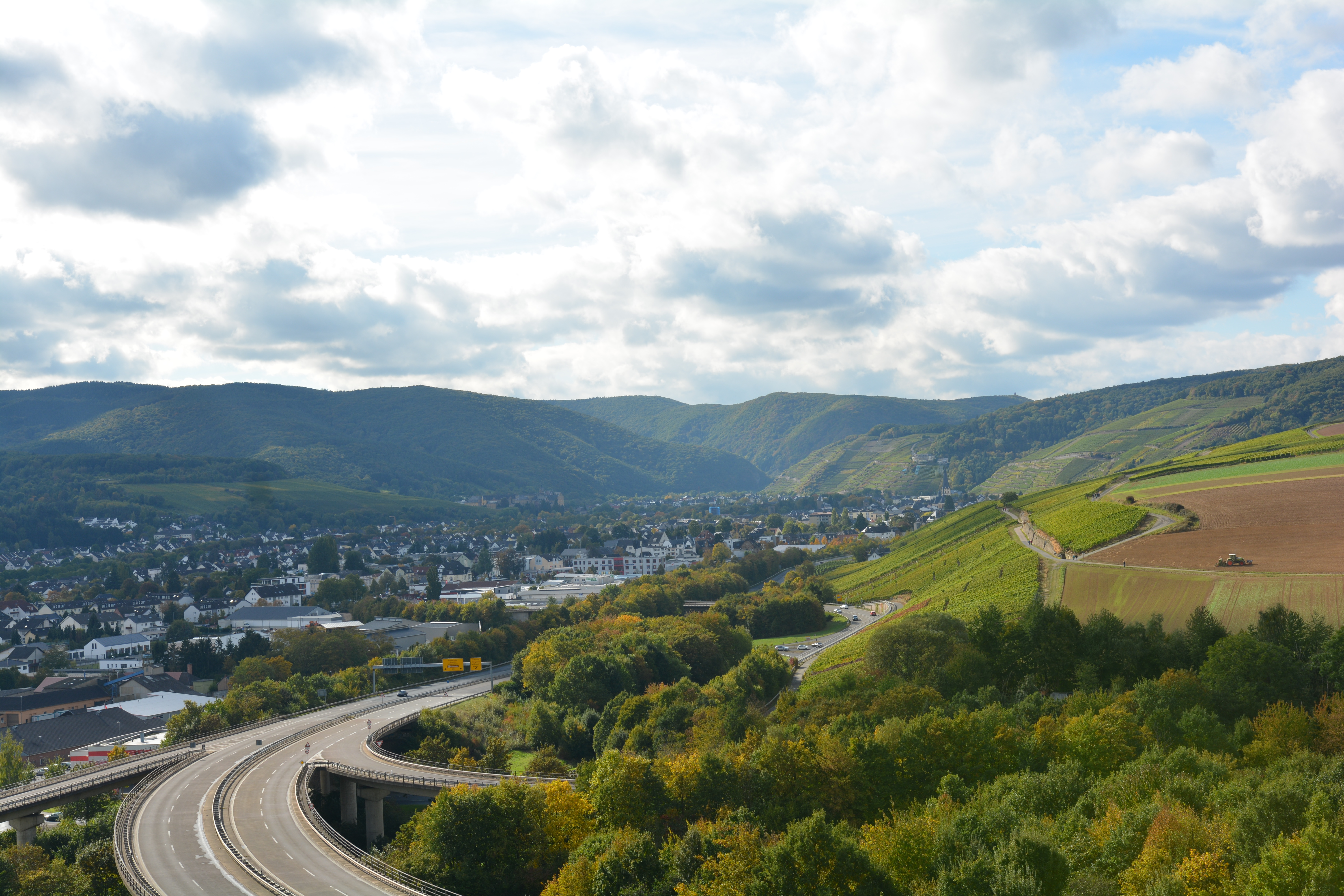 Das Ahrtal zwischen Bad-Neuenahr und Lantershofen mit Verkehrskreuz B266 / B267